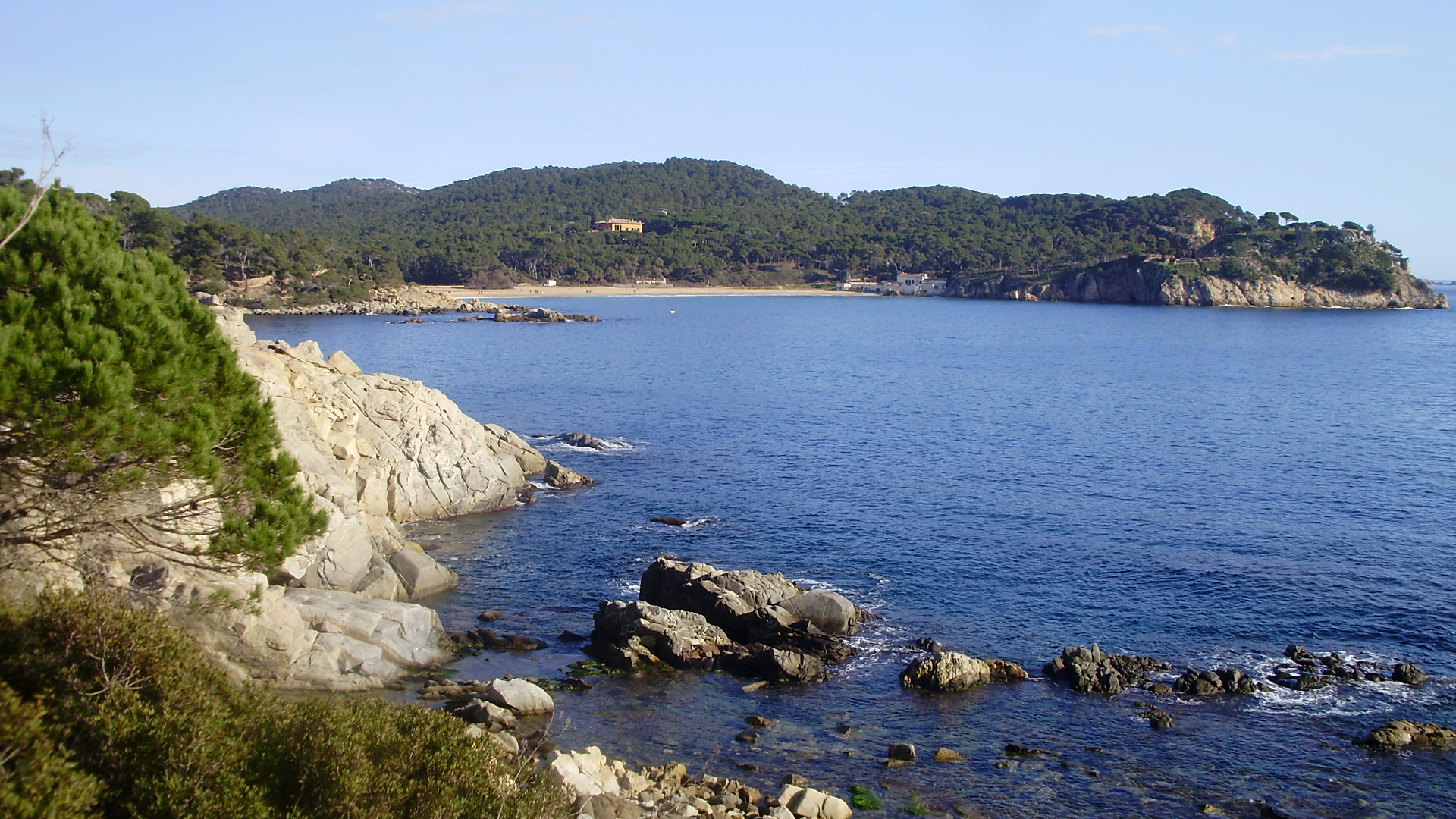 Vista platja de Castell-Camí de ronda Palamós a les Cales Cala Estreta (Costa Brava)